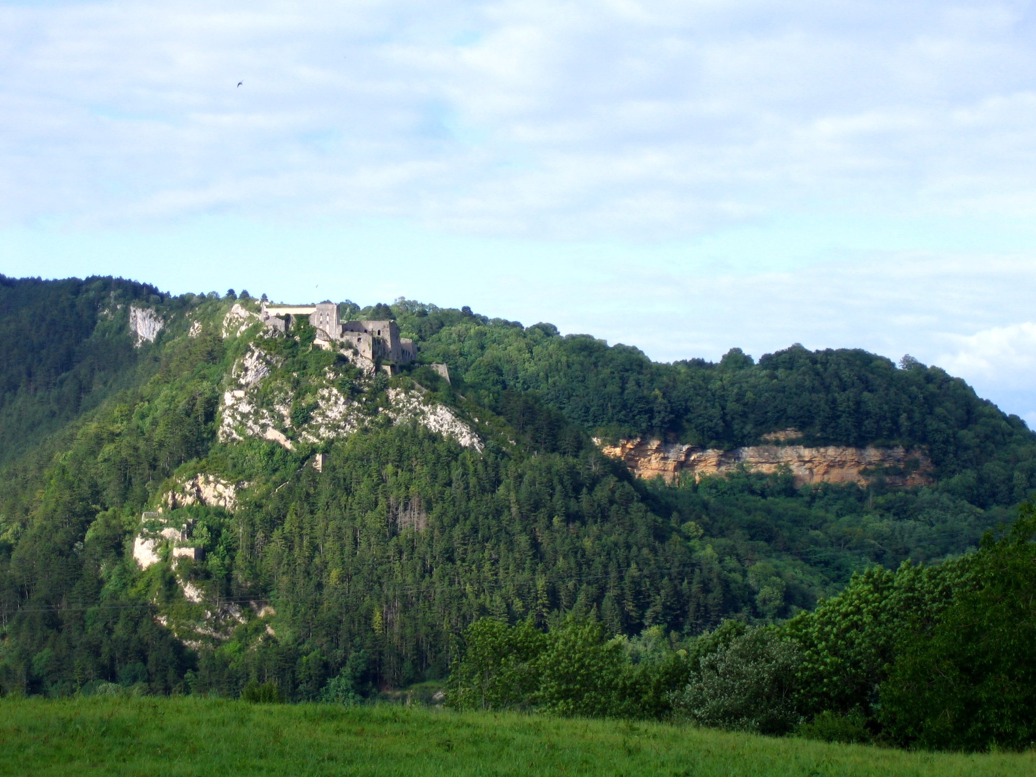 Mont Belin, Salins-les-Bains(39)